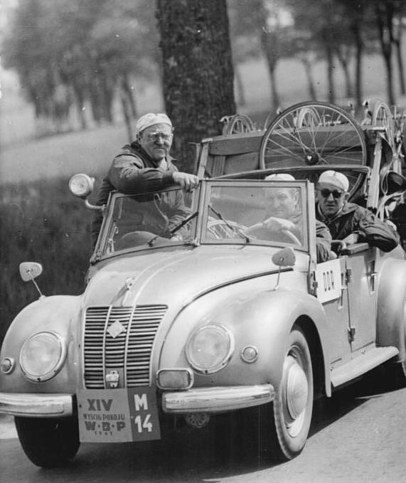 Friedensfahrt, DDR-Begleitfahrzeug Zentralbild Wendorf 5.5.1961 XIV. Internationale Friedensfahrt Warschau-Berlin-Prag 1961. 3.Etappe von Olsztyn nach Gdansk am 4.5.1961. UBz: Sehr genau verfolgt Trainer Weissbrod den Rennverlauf. Vorn Fahrer Busse, dahinter Mechaniker Winkler.